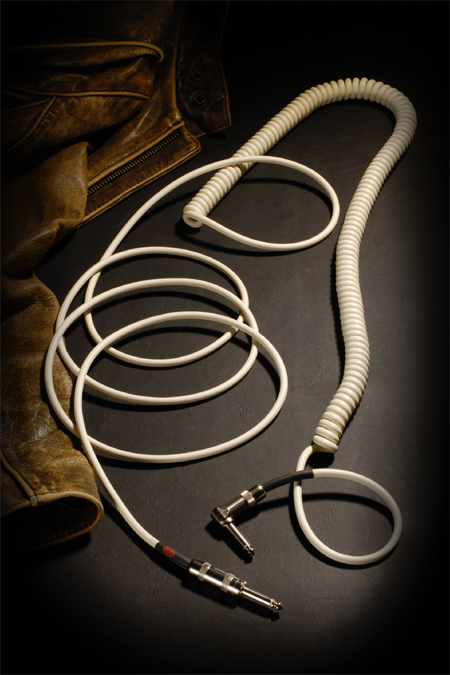 神鳴カール・ケーブル